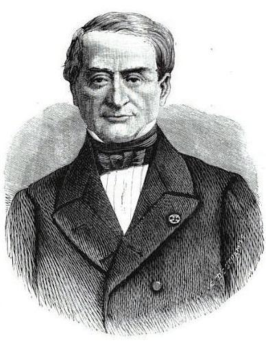 Eugène Schneider.